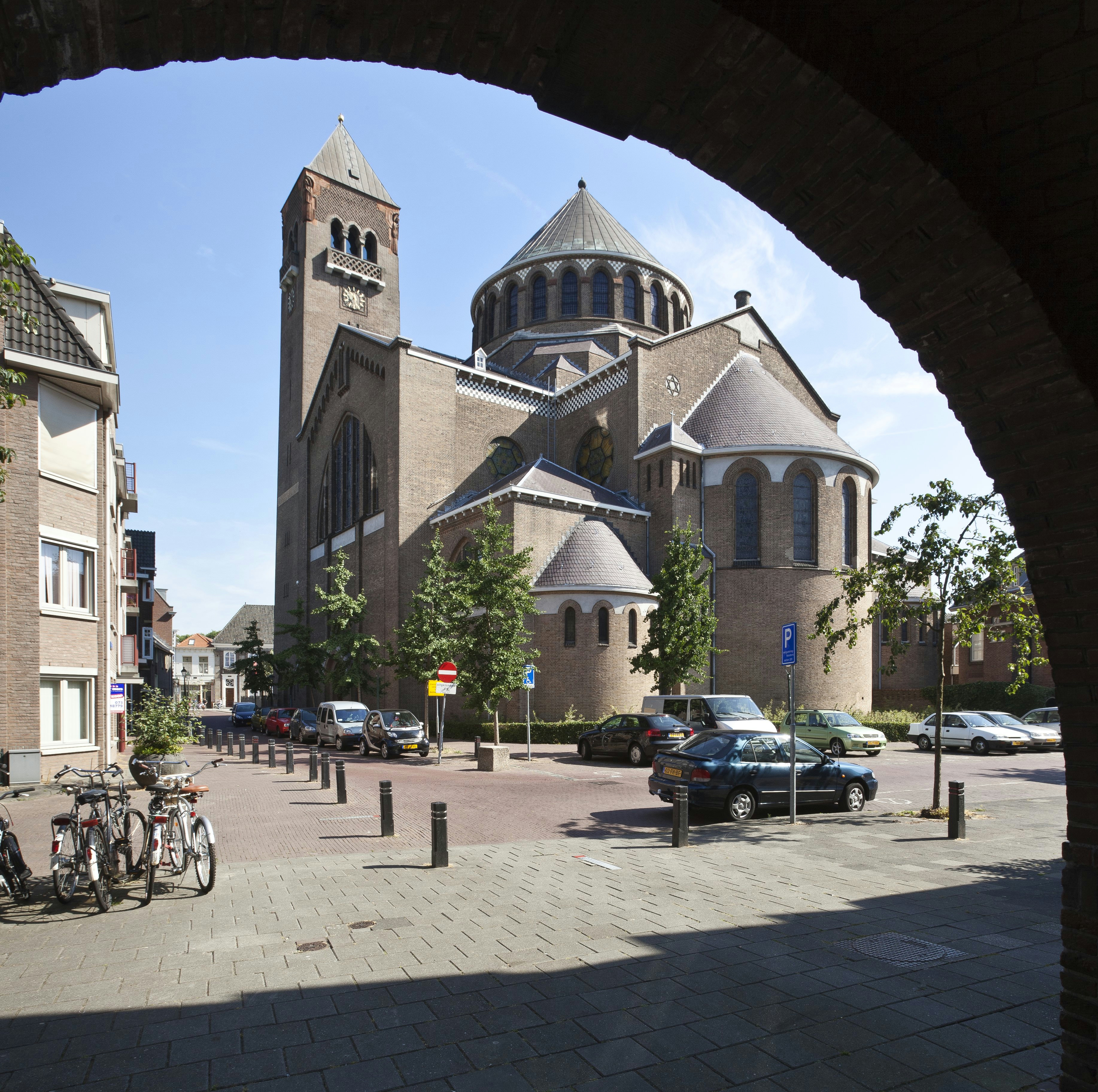 Sint Jacobskerk: Doorkijk met zicht op zuidgevel en oostgevel